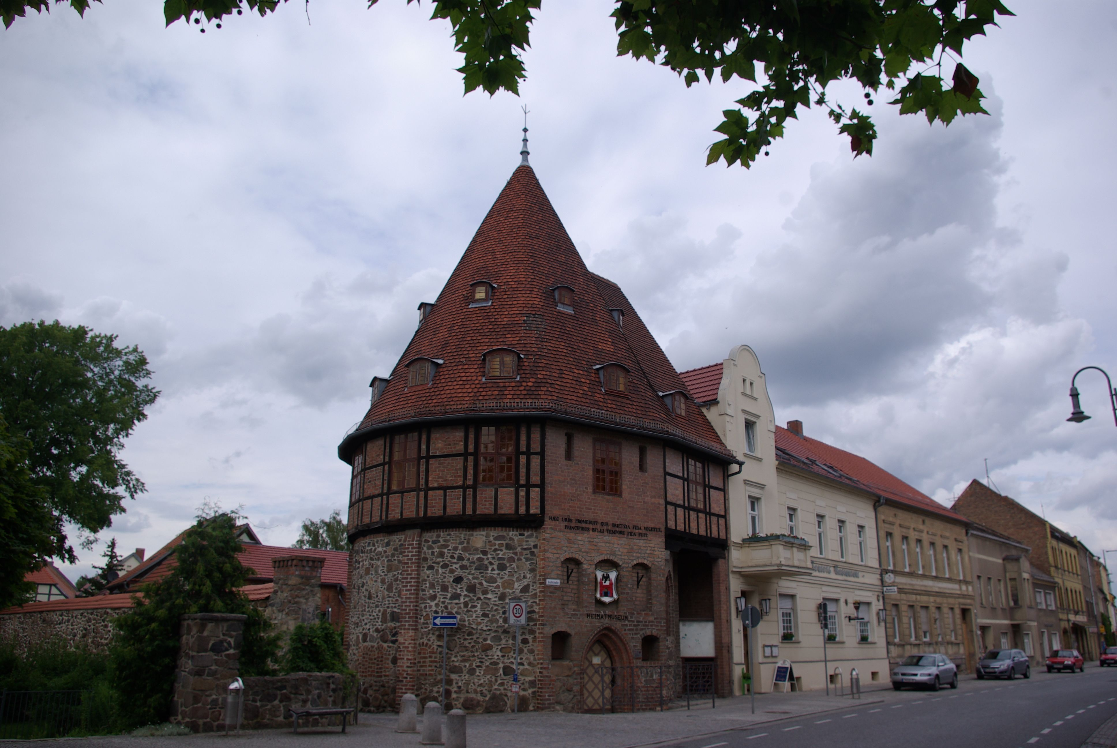 Treuenbritzen, Brandenburg. Das Heimatmuseum in der ehemaligen Heilige-Geist-kapelle. Das Gebäude steht unter Denkmalschutz.